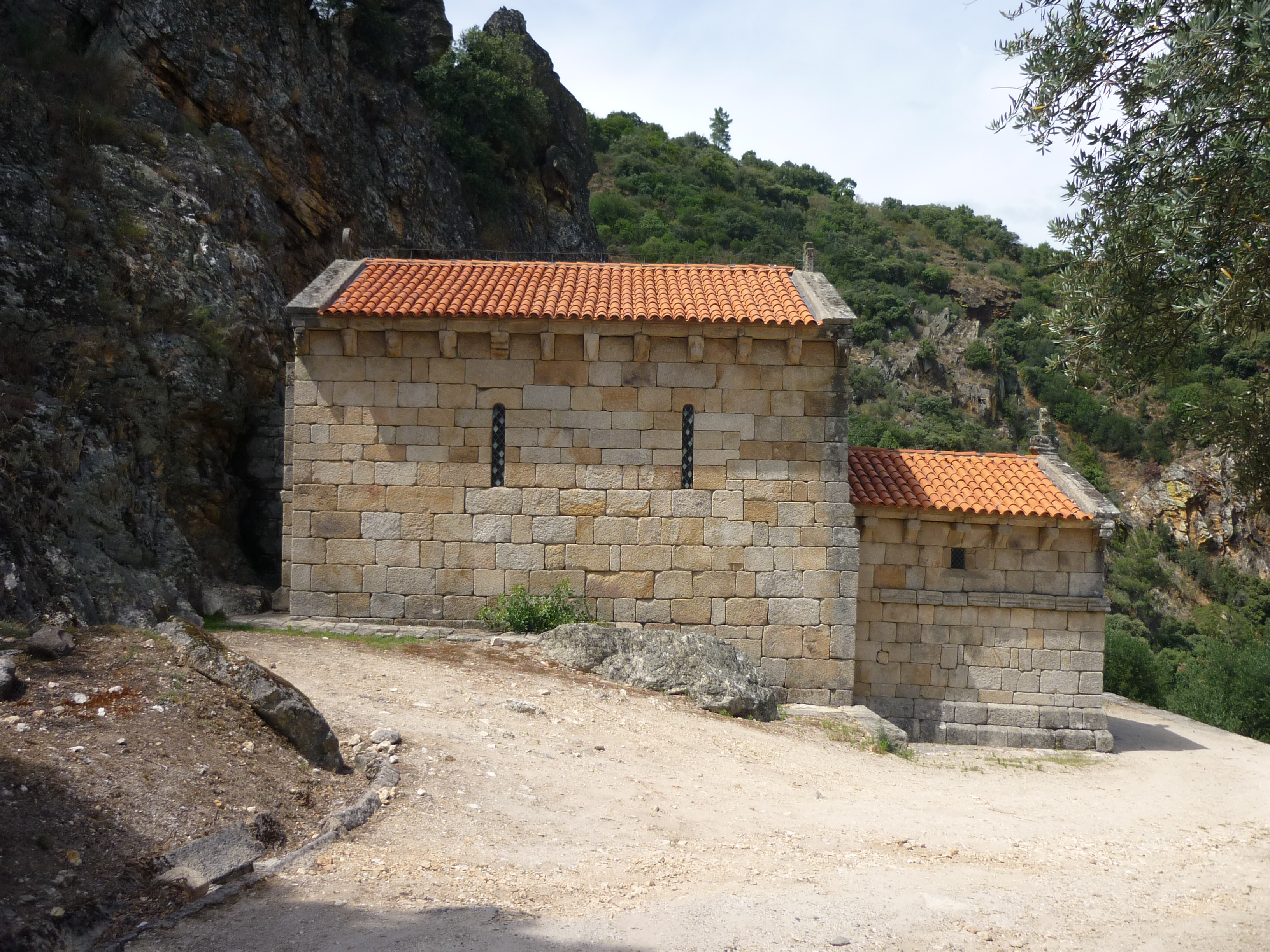 romanische Kirche der ehem. Einsiedelei